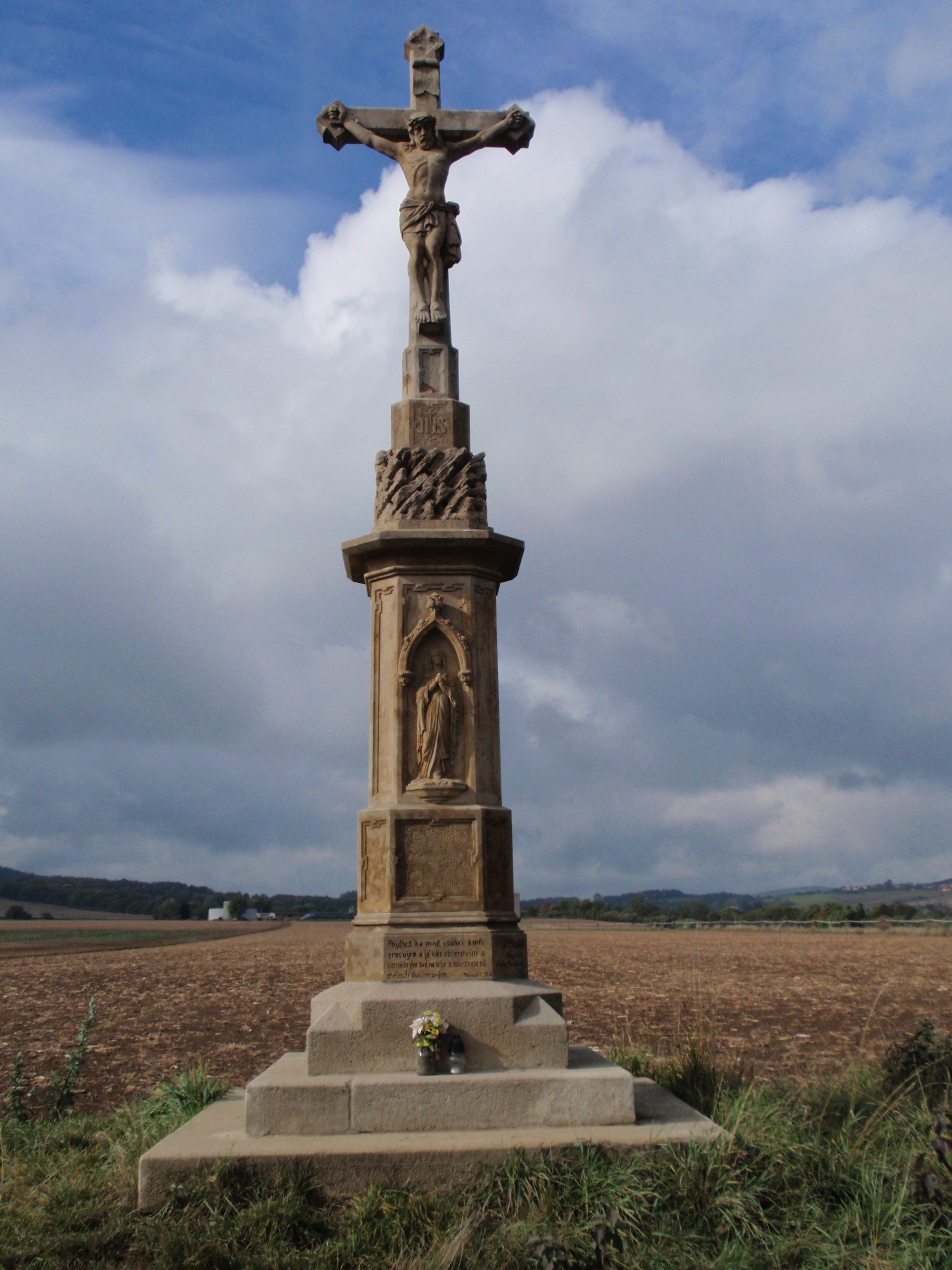 Dědice, Padouchy, Socha ukřižovaného Krista (krucifix)